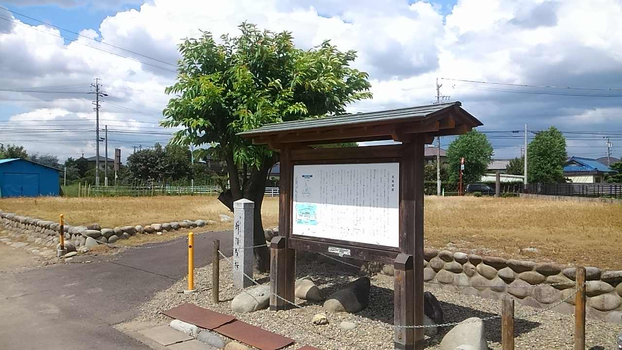 跡地には解説板と蜂須賀桜